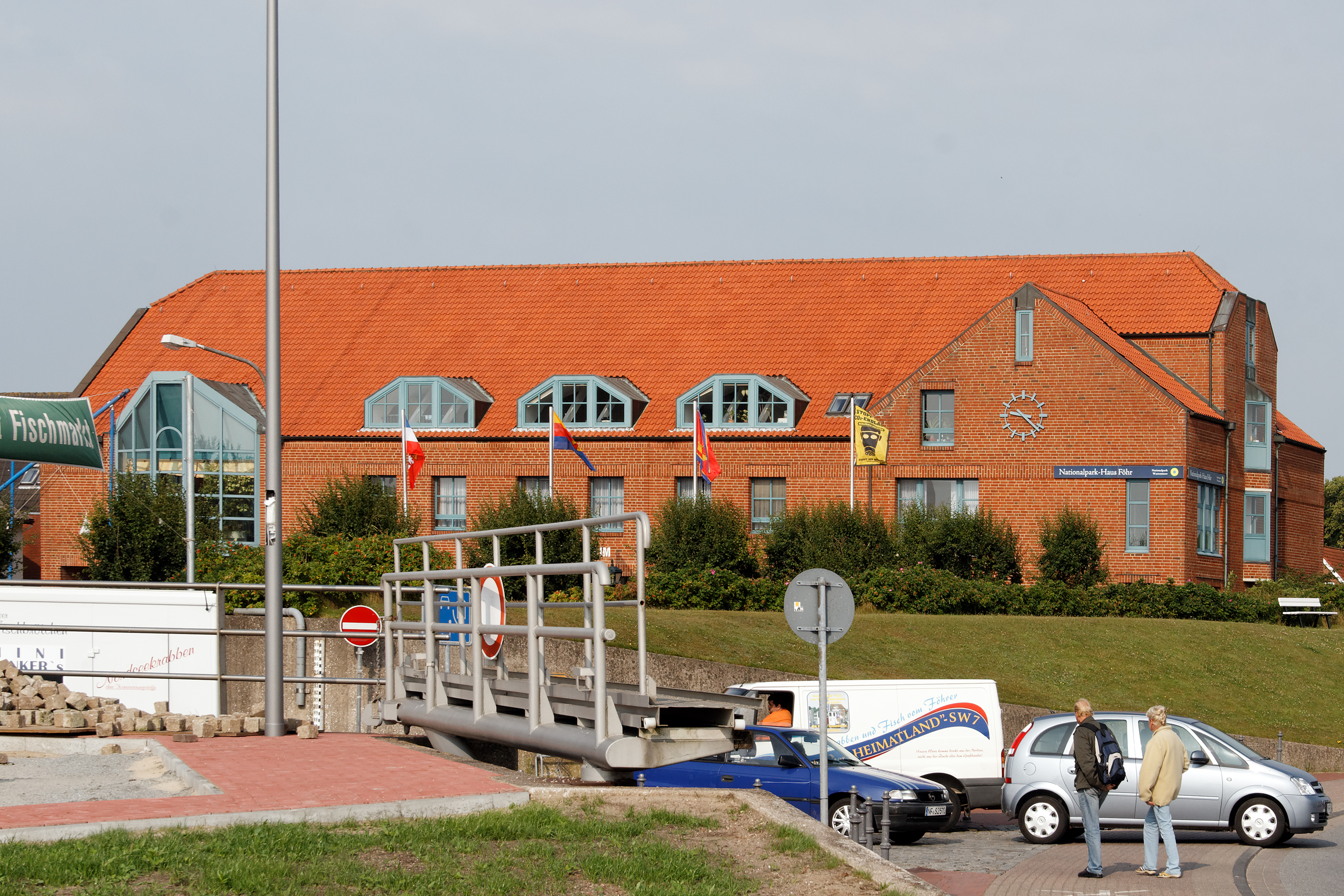 Verwaltungsgebäude des Amtes Föhr-Amrum in Wyk auf Föhr.